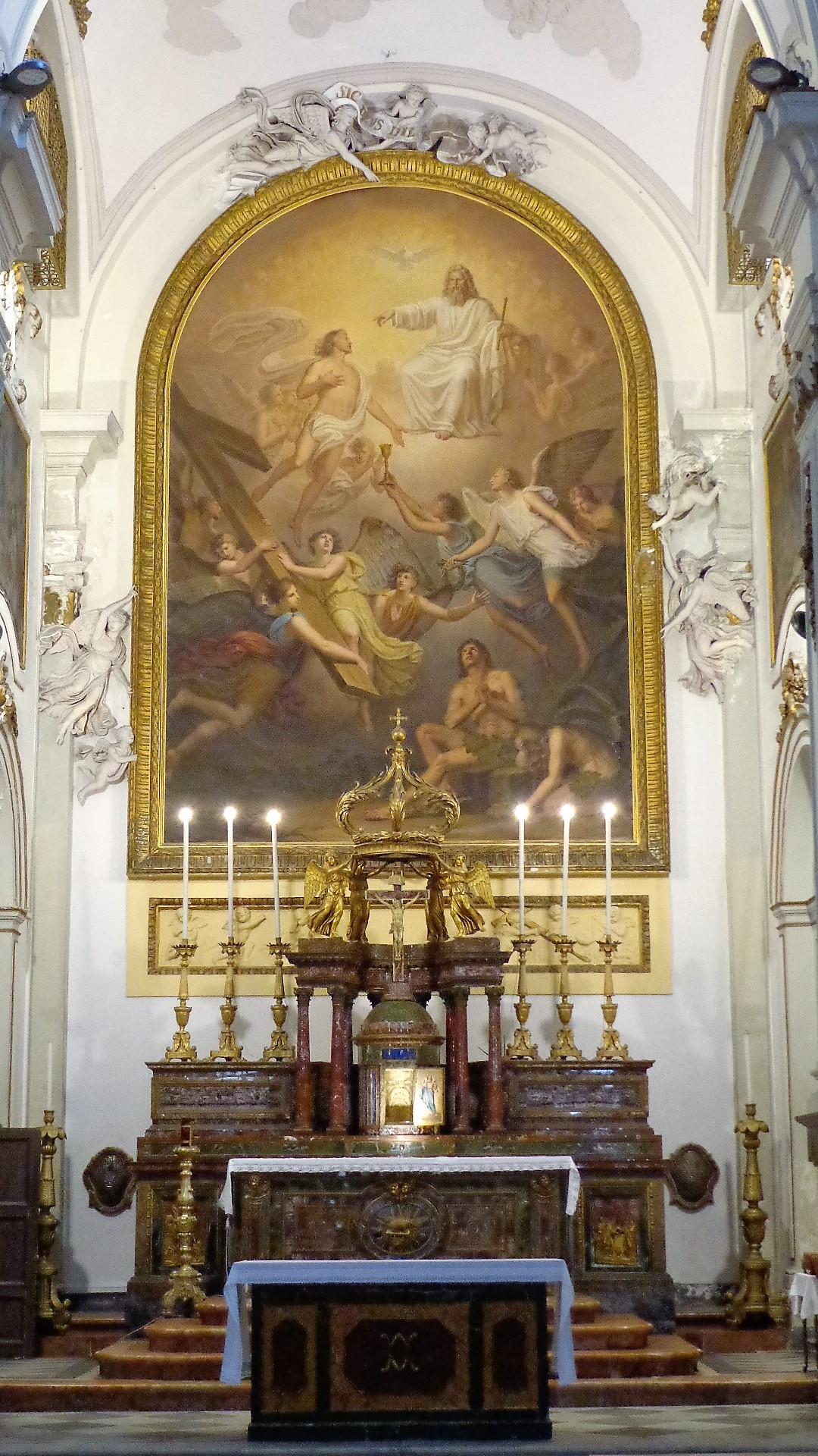 Santissima Trinità, pala dell'altare maggiore nella Chiesa della Madonna di Monte Oliveto di Palermo